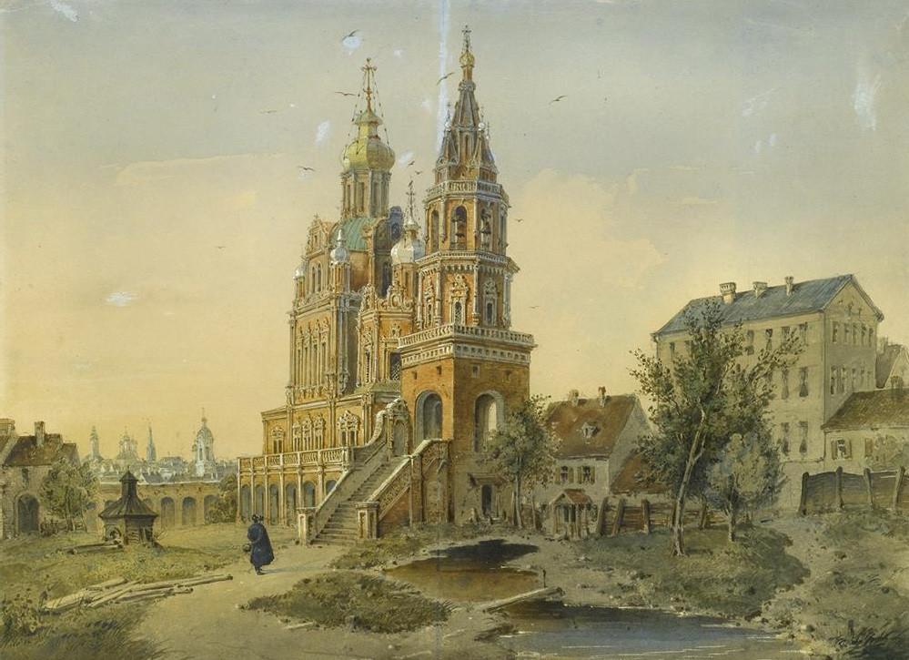 А. Вейс. Церковь Успения на Покровке. 1845 г.